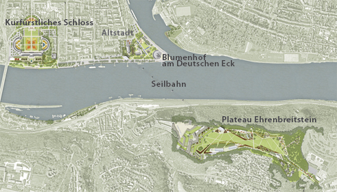 Übersicht Gelände BUGA 2011